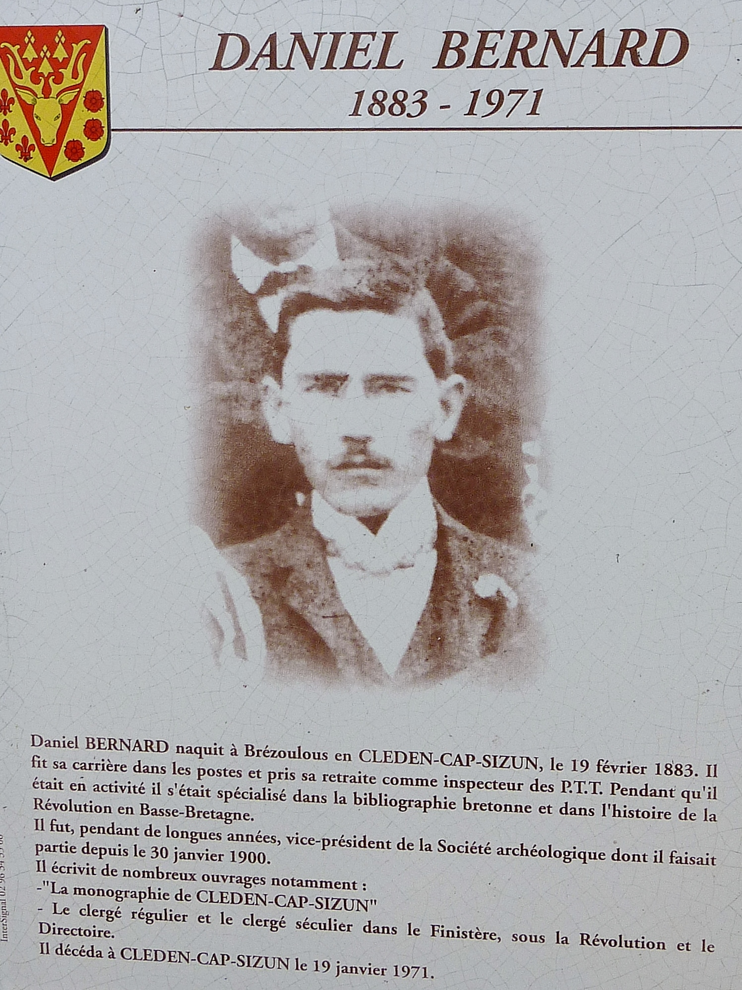 Plaque commémorative de Daniel Bernard située près de la chapelle Notre-Dame de Langroas.